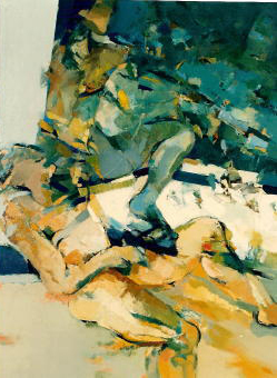 "Weekend", olej na płótnie 130x100